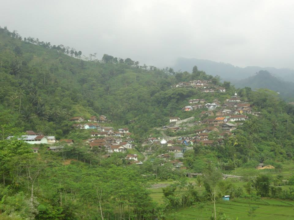 Pasegeran